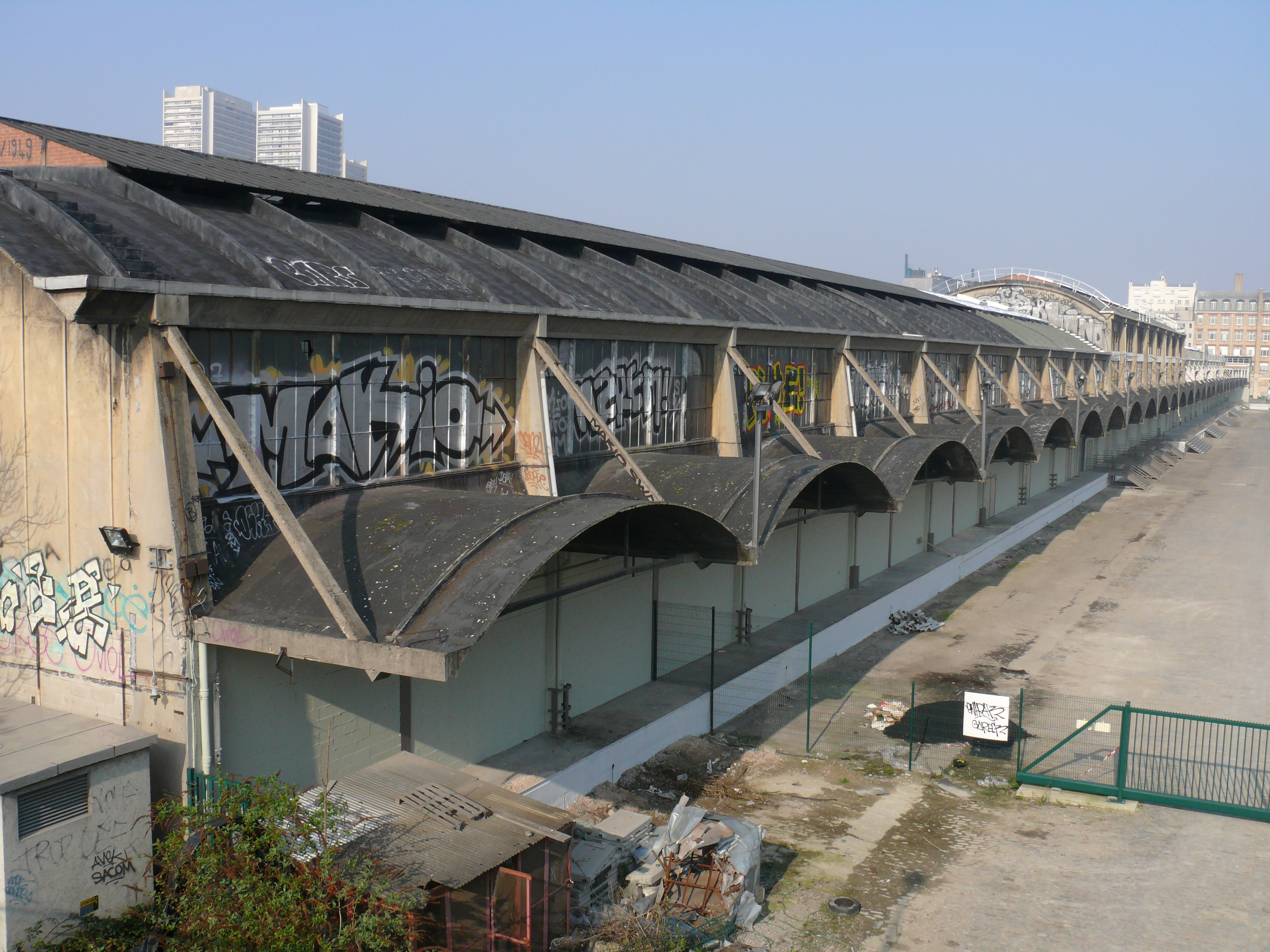 Halle Freyssinet - Auvents côté départ (nord) vus de l'est